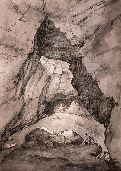 1784 gefertigte Zeichnung der im Harz gelegenen Einhornhöhle durch den Künstler Georg Melchior Kraus ...